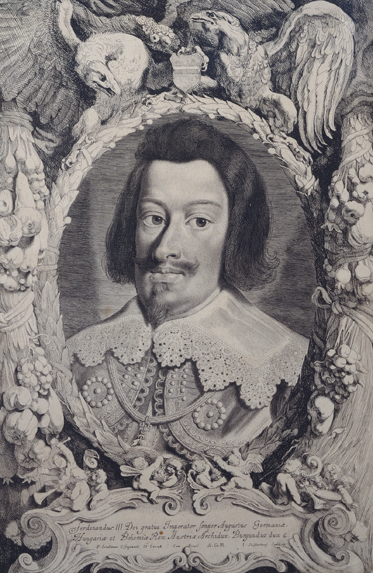 Porträtstich Kaiser Ferdinand III.